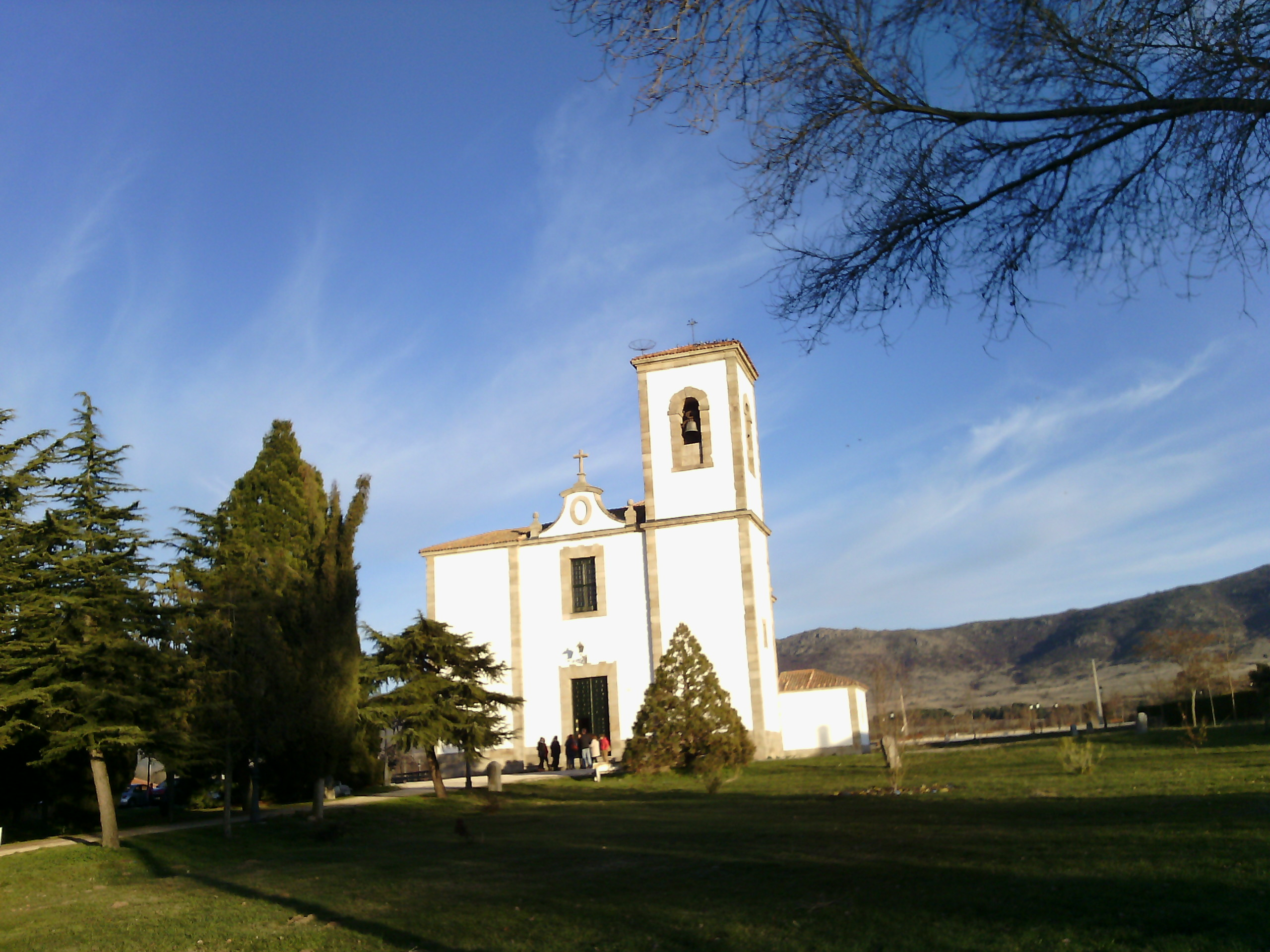 Esta es la Iglesia de la Concepcións de Trescasas, Segovia. Mandada construir por Carlos III.